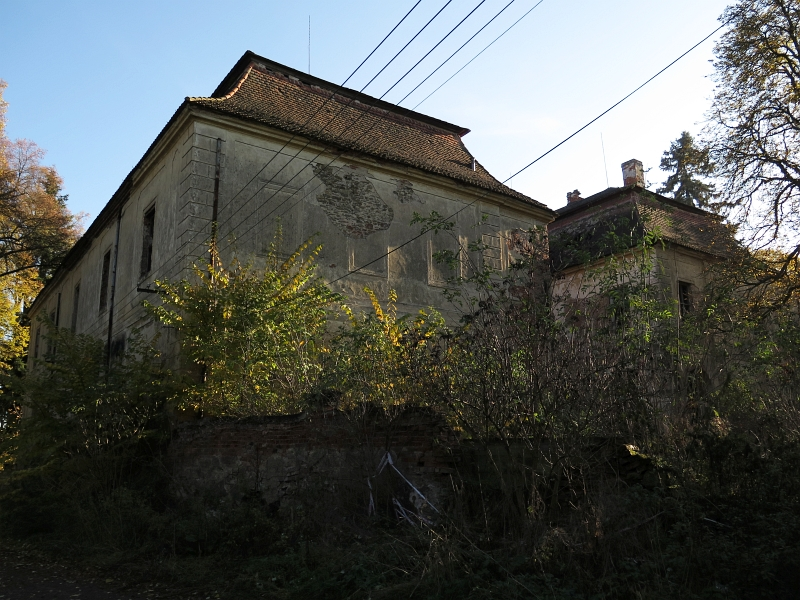 Zámek Nekmíř, Nekmíř 1, Nekmíř.